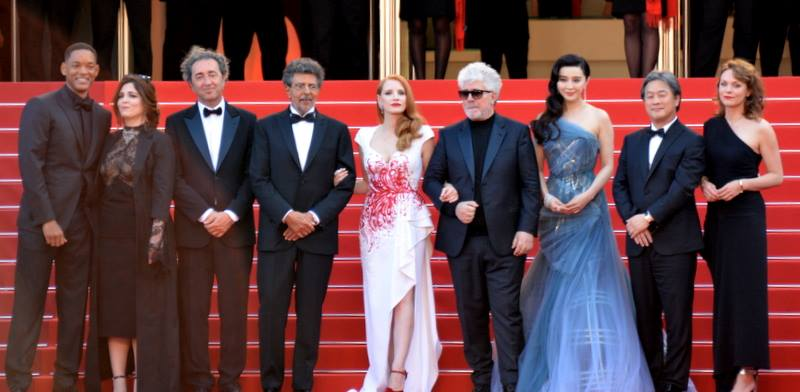 Le jury des long-métrages au festival de Cannes 2017 : Pedro Almodóvar, Fan Bingbing, Jessica Chastain, Will Smith, Agnès Jaoui, Paolo Sorrentino, Park Chan-wook, Maren Ade et Gabriel Yared